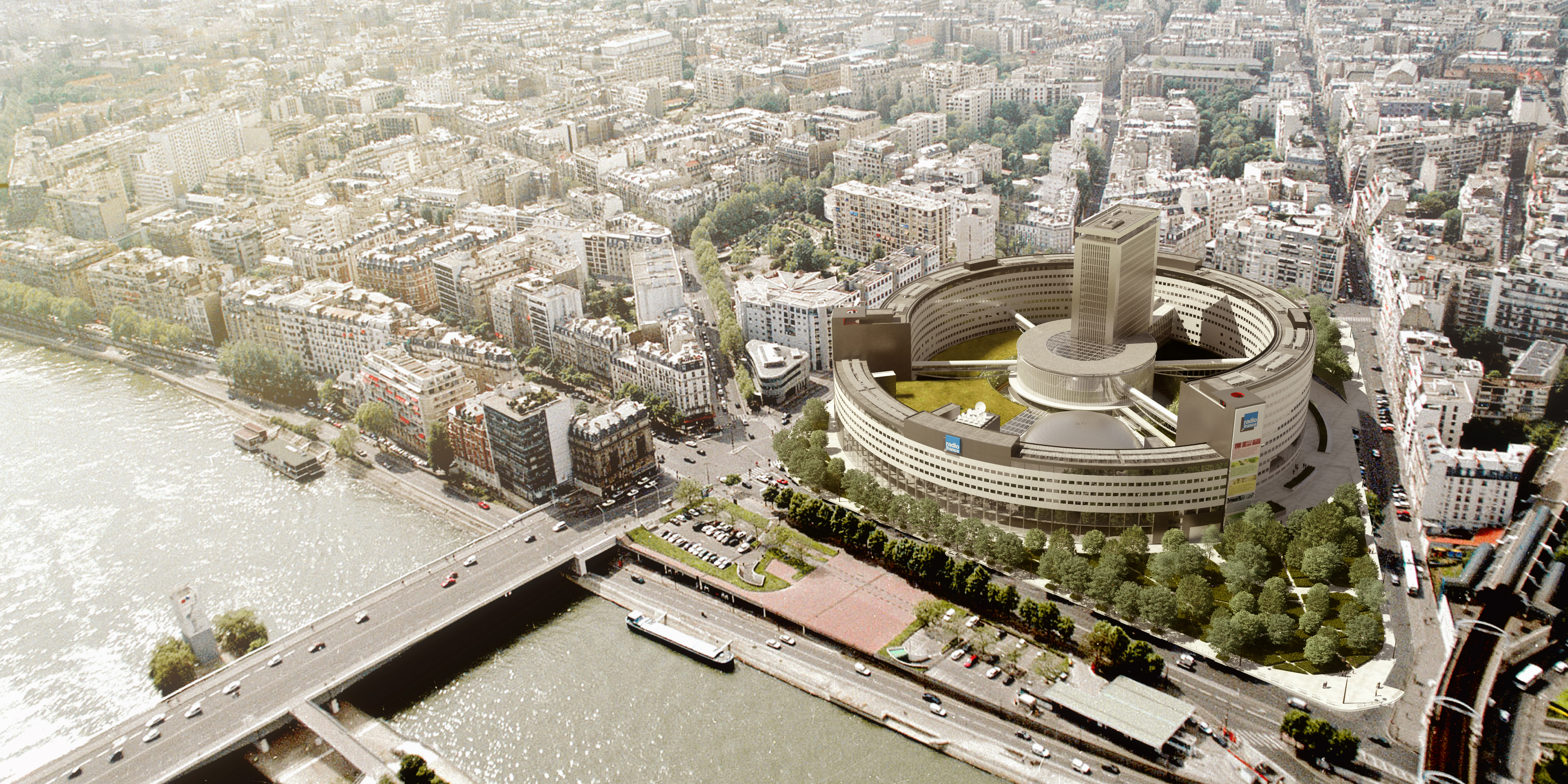 Restructuration de la Maison de Radio France, Paris, par AS.Architecture-Studio